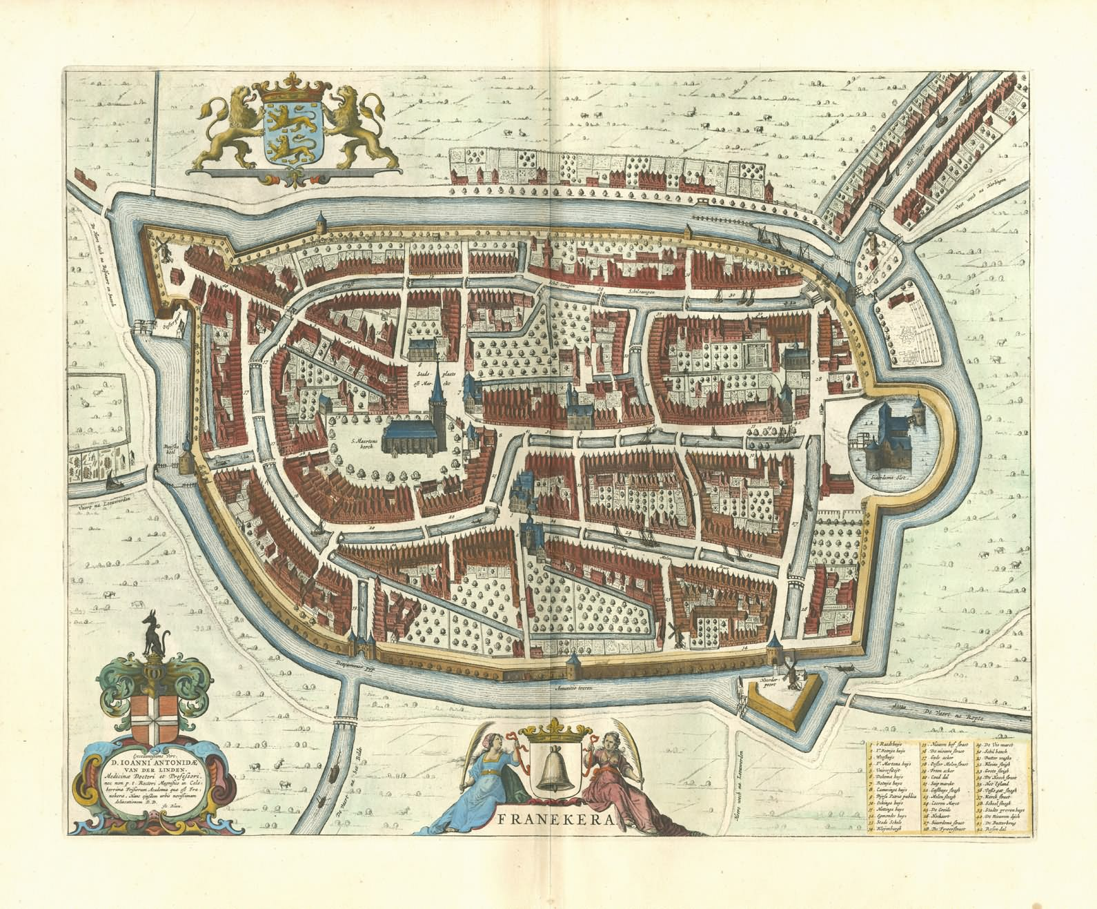 title: Franekera; size: 41 x 51